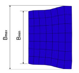 ایجاد شده در اثر عدم وجود غلطک محوری